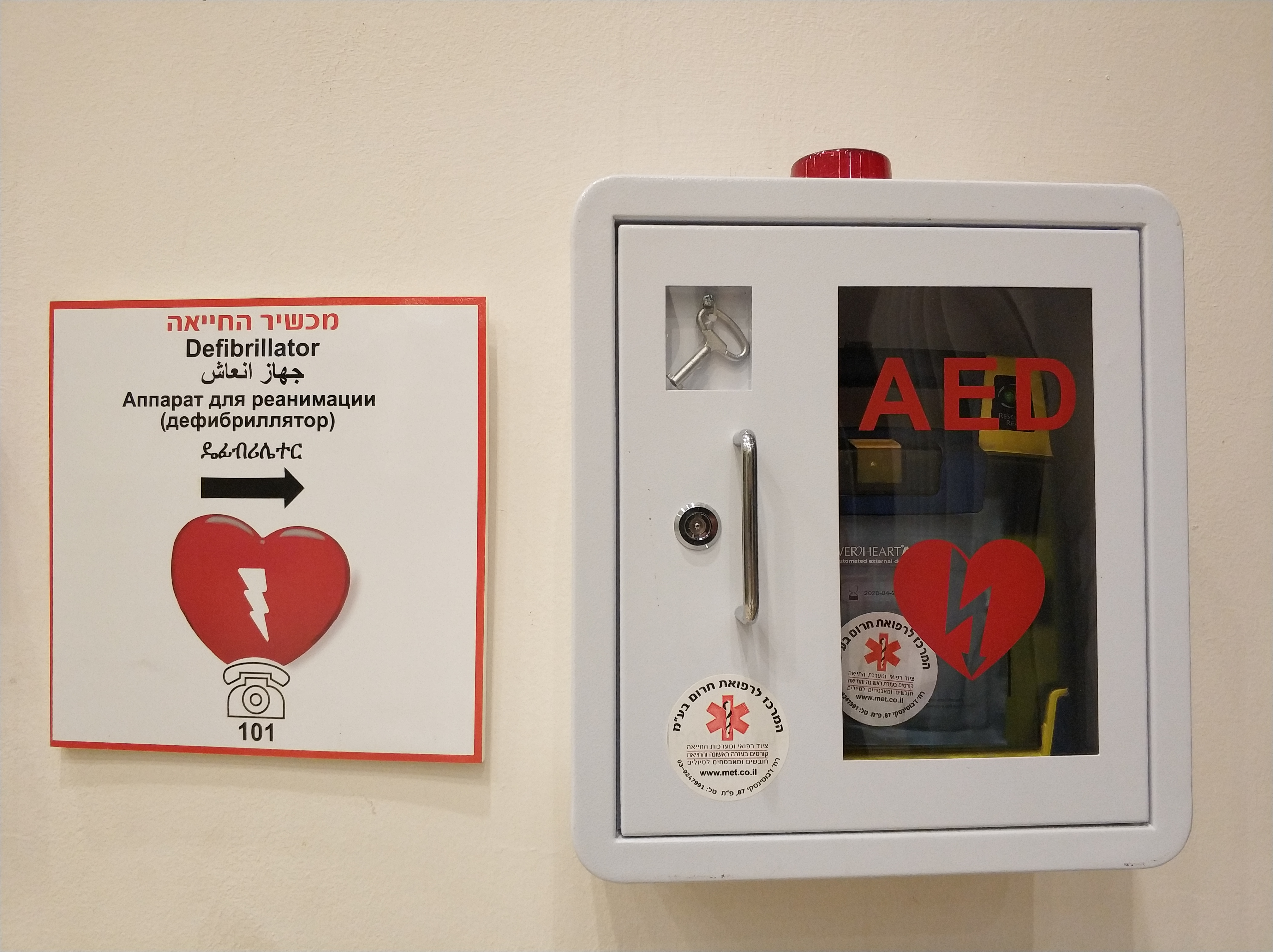 עמדת דפיברילטור בכמה שפות בבניין ציבורי